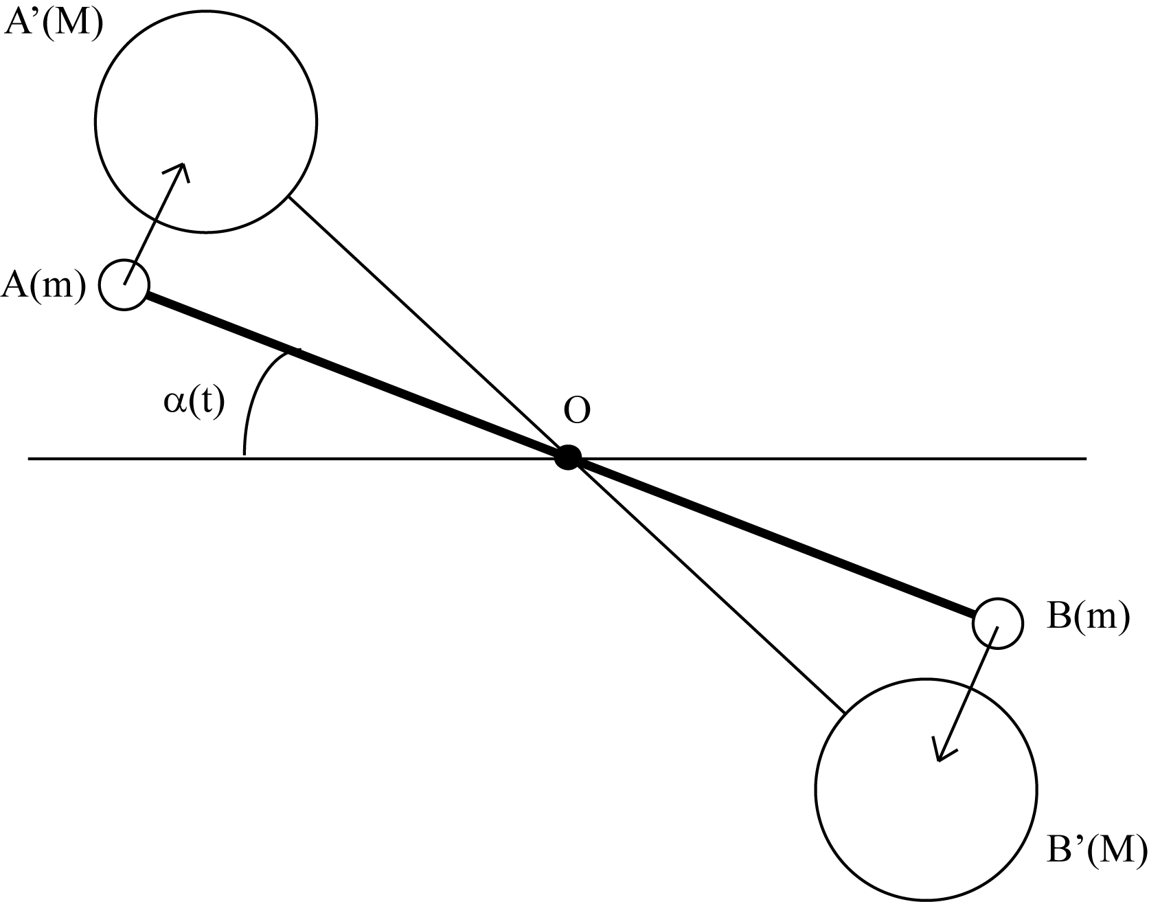 Schéma d'un pendule de torsion